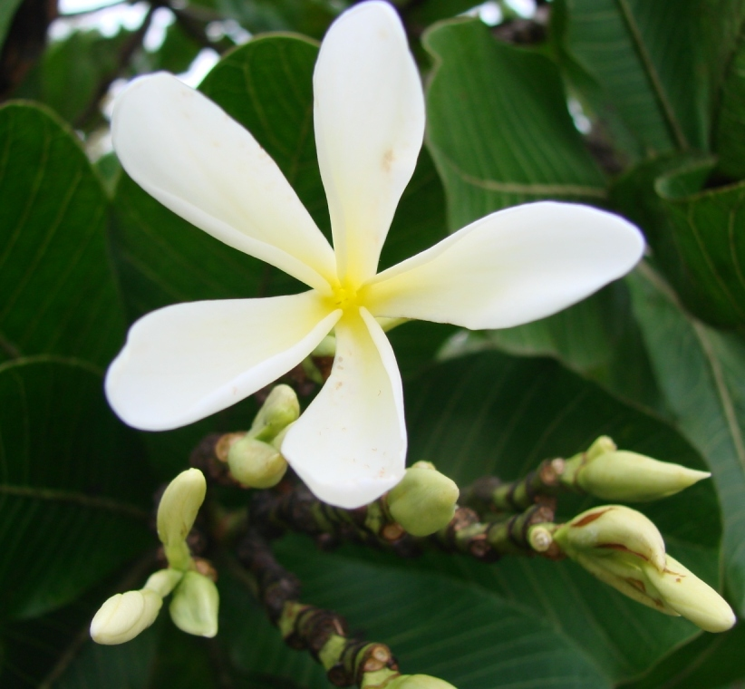 Himatanthus obovatus - Apocynaceae Cavalcante - GO - Brasil